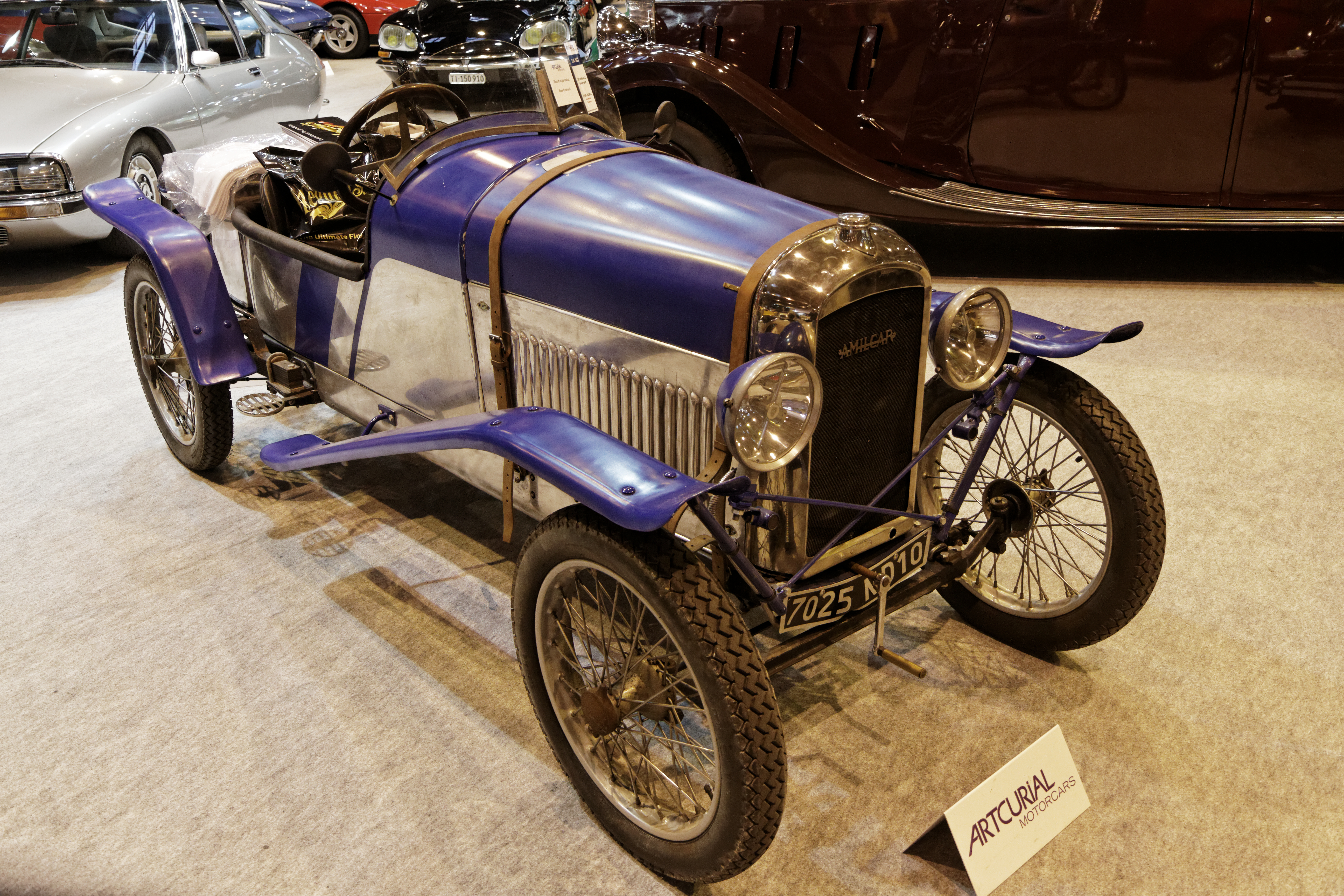 Une Amilcar CC biplace sport exposée lors du salon Retromobile 2014